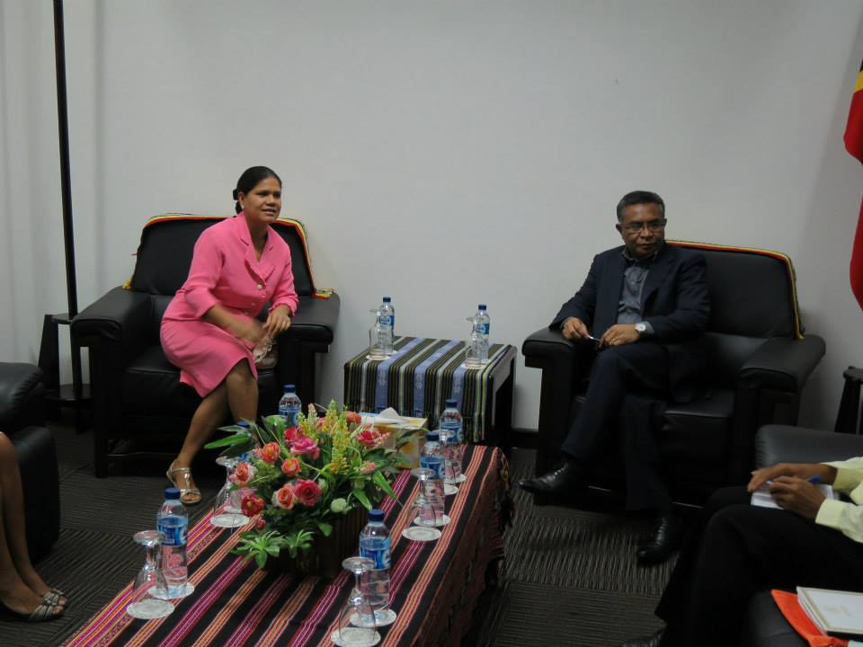 First Lady und Premierminister